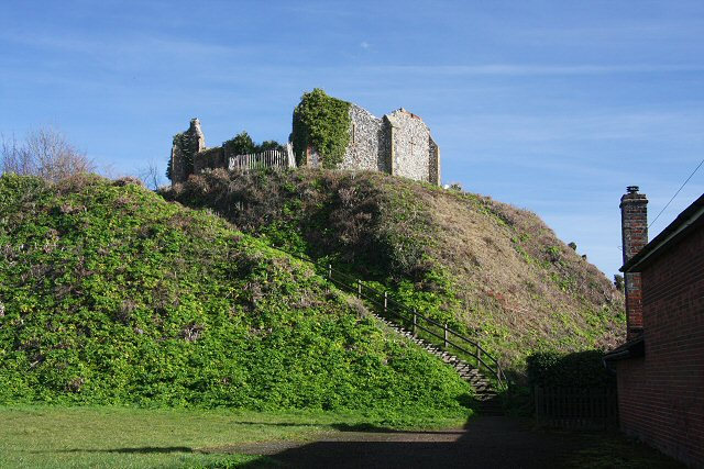 Eye Castle